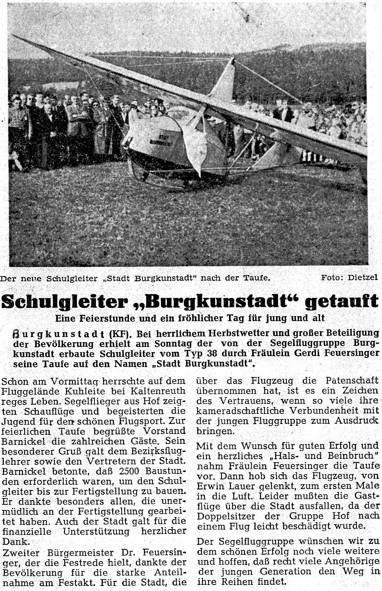 Zeitungsfoto der Taufe des Segelfliegers "Stadt Burgkunstadt" des Segelflugverein "Kordigast".